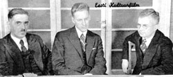 Eesti Kultuurfilmi juhatus, vasakult H. Viikman, E. Kigaste ja O.Angelus (foto ajakirjast)